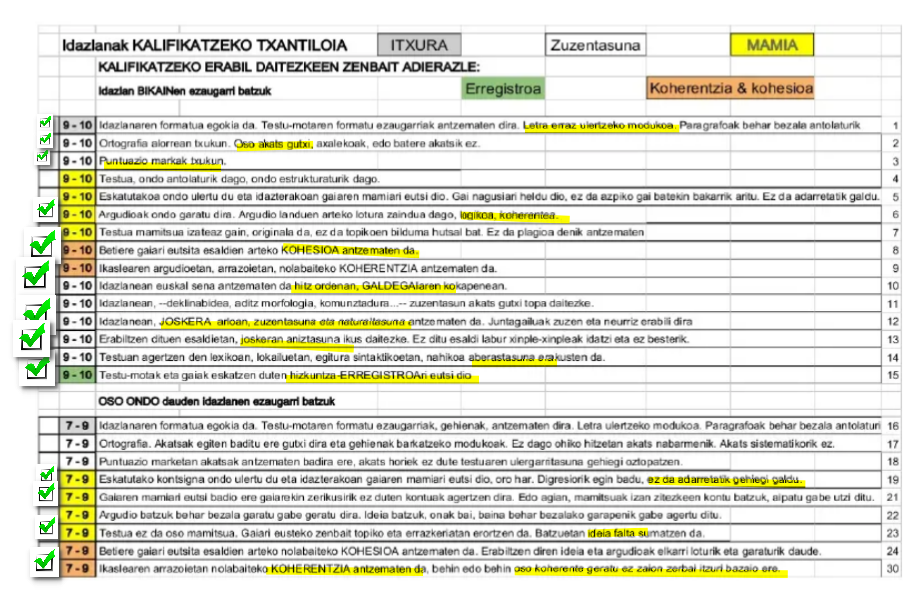 Idazlanak ebaluatzeko errubrika baten zati bat